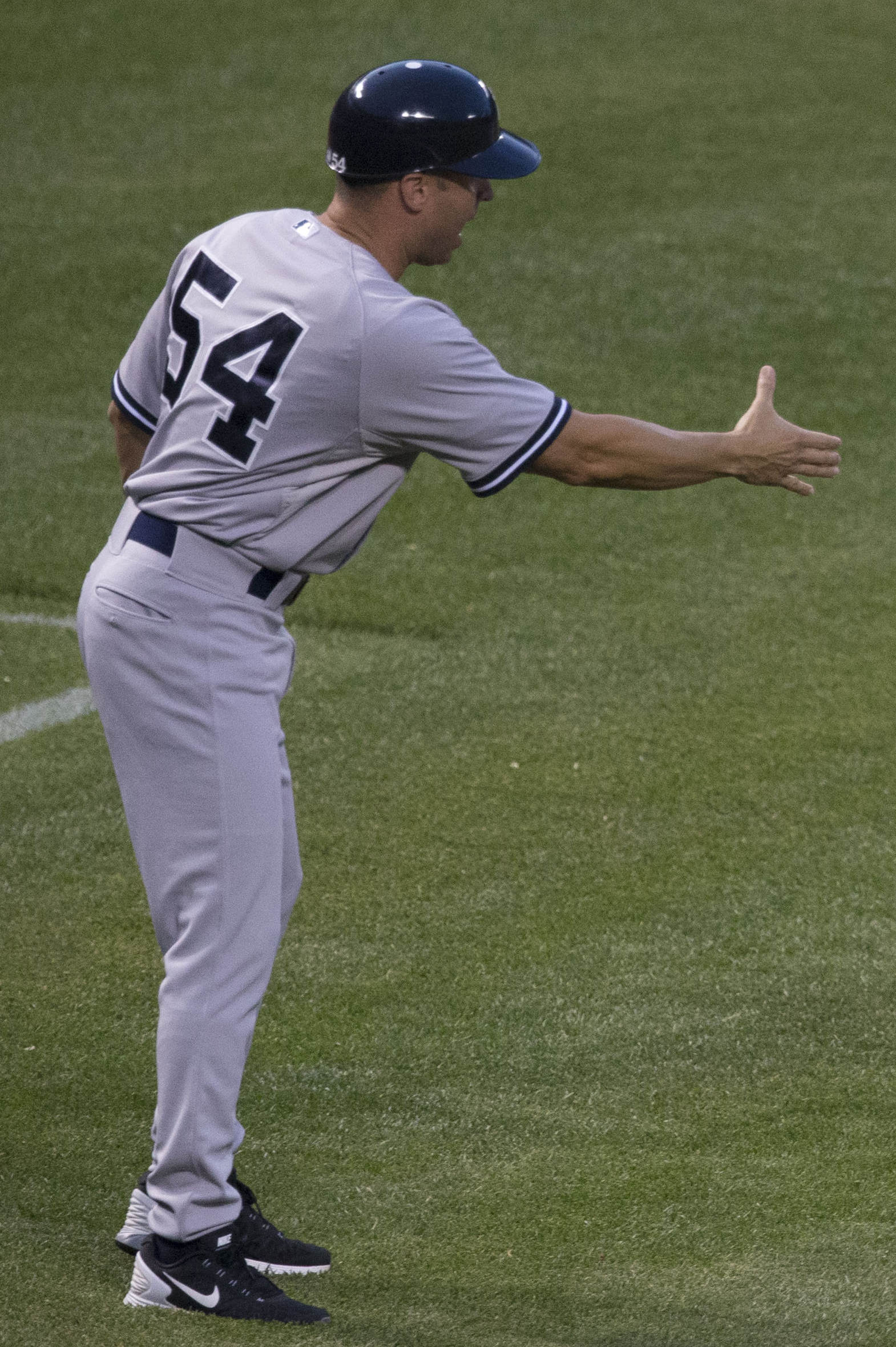 Joe Espada